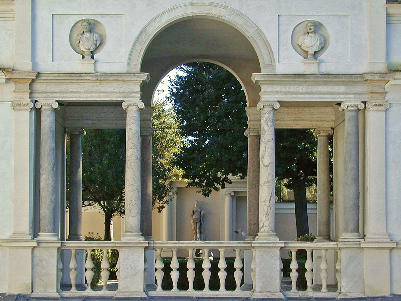 Le nymphée de Bartolomeo Ammannati est dans le style maniériste. L'ensemble est un modèle d'équilibre et de raffinement. Le nymphée comprend 3 niveaux incluant une loggia pourvue d'un escalier en fer à cheval. A l'étage supérieur, un balcon pourvu de niches décorées de bustes romains domine le nymphée.